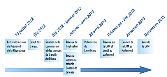 Étapes des travaux du Livre blanc sur la Défense et la Sécurité nationale 2013 (France).